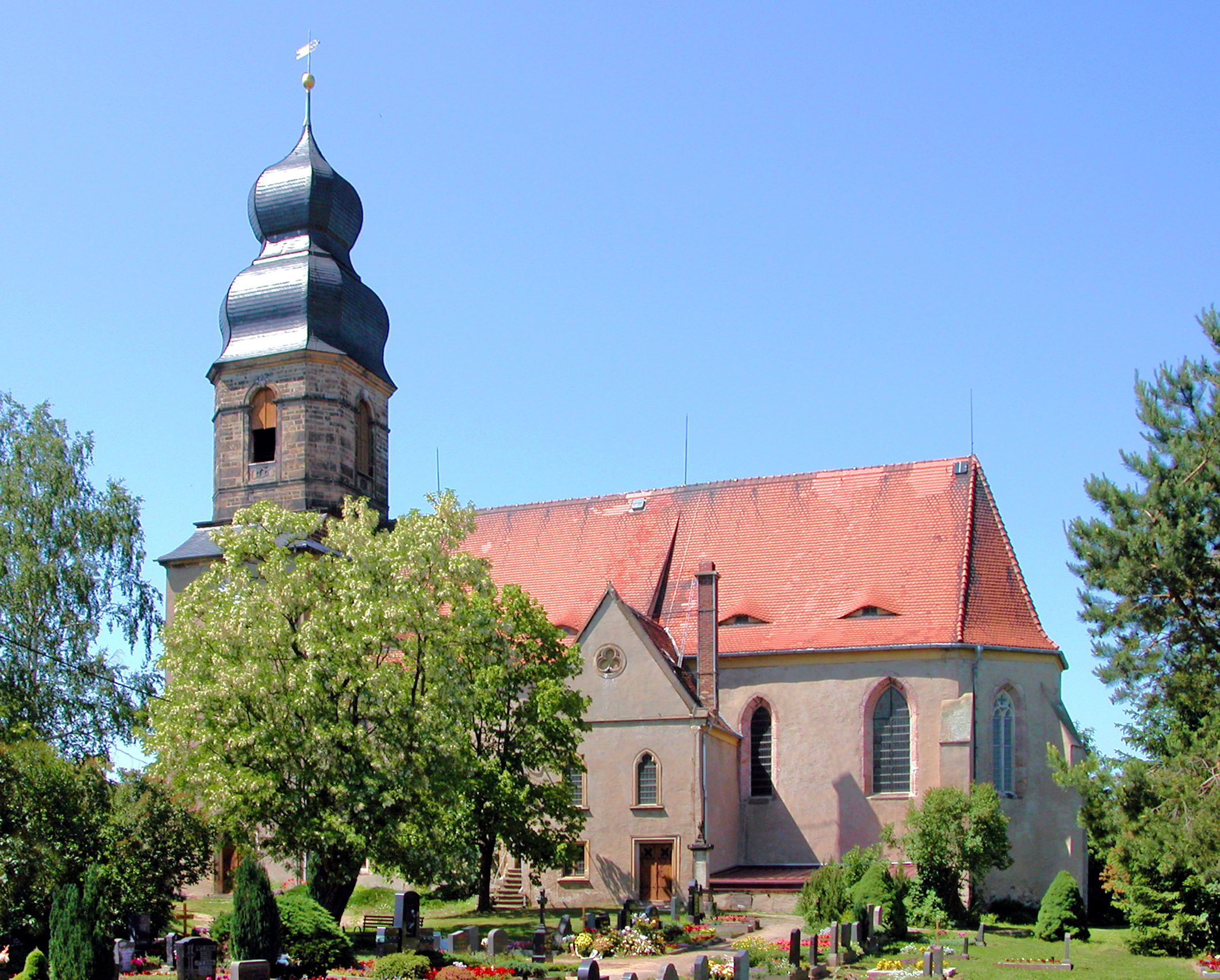 30.05.2003 01623 Leuben (Nossen): Bergkirche. [DSCN0126-0132.JPG]20030530290DR.JPG(c)Blobelt